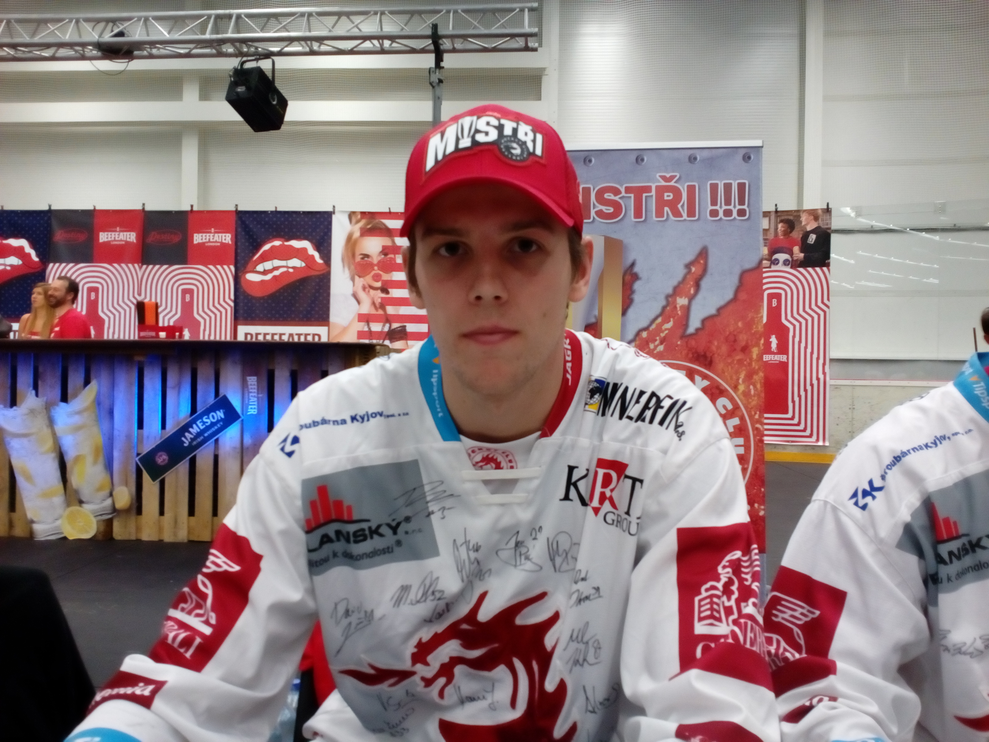 Po zakončení sezóny 2018/19 na autogramiádě v malé (tréningové) Werk Areně